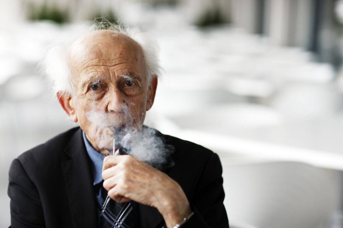 European Culture Congress, 8 - 11.09.2011 Wroclaw, Poland Europejski Kongres Kultury, 8 - 11.09.2011 Wrocław, Polska Wykorzystywanie wizerunków osób sfotografowanych w innych celach niż informacyjne dot. Kongresu jest bezwzględnie zakazane. CC nie obejmuje praw do wizerunku.